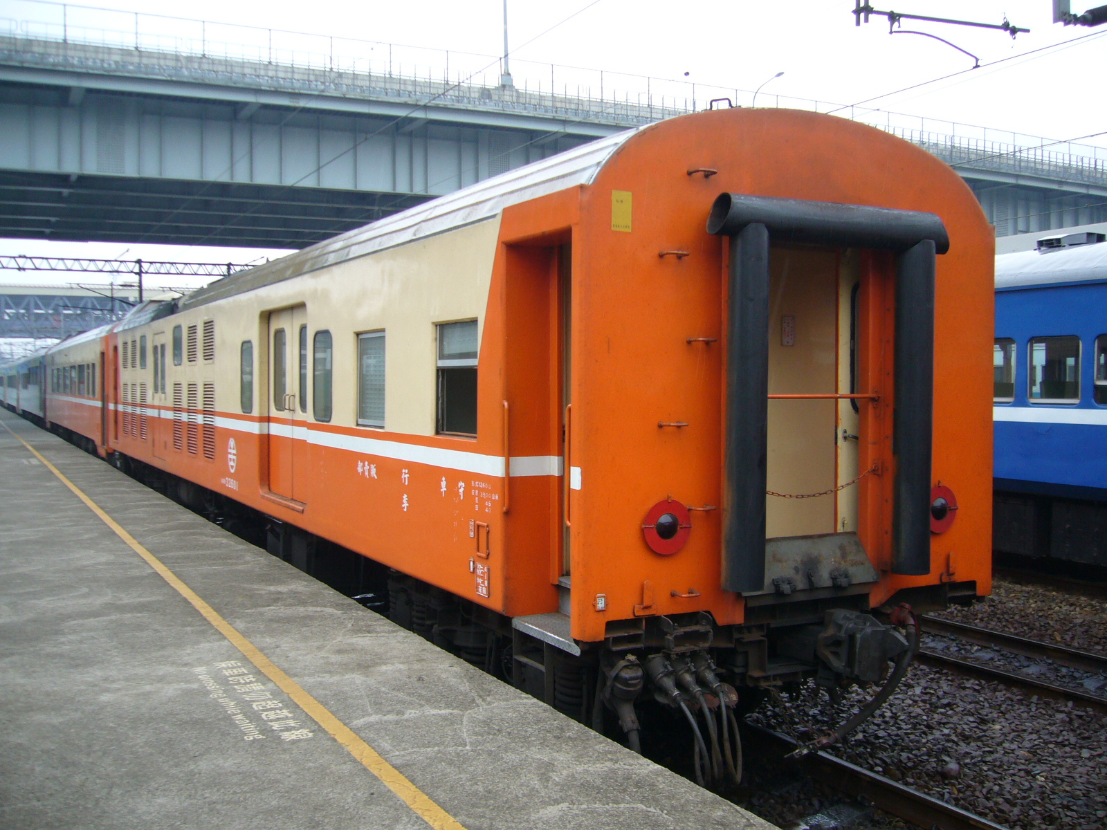 中文（台灣）: PBK32601總裁一號2次，攝於高雄站。